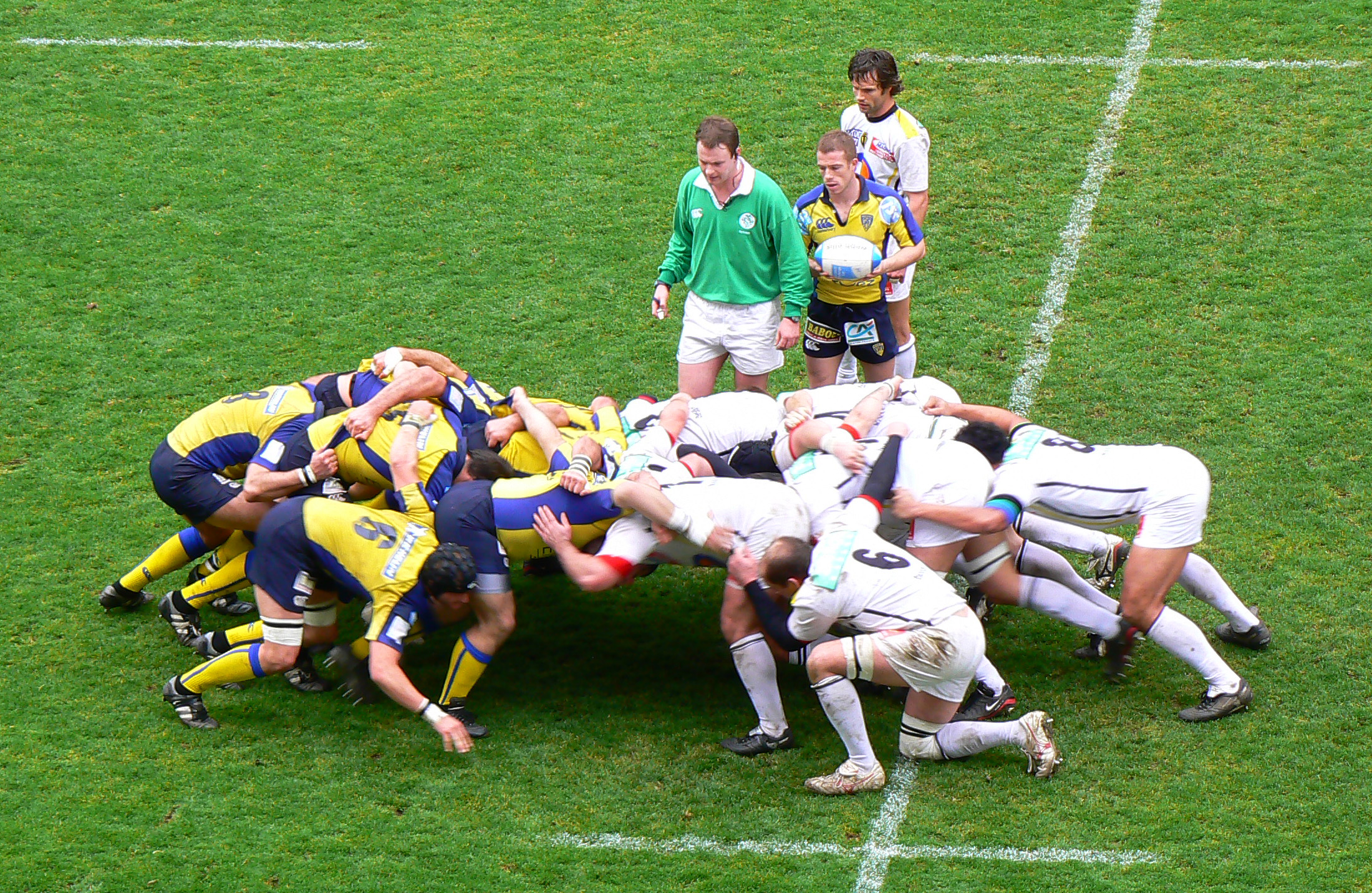 Une mélée lors du match opposant le SC Albi à l'ASM Clermont Auvergne au stade Marcel Michelin de Clermont-Ferrand.